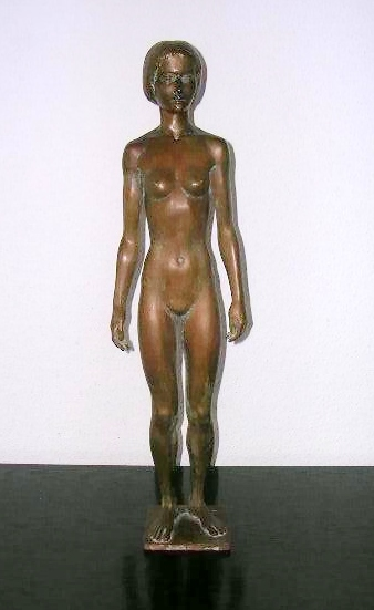 Kleinplastik „Brigitte“, Bronze, 1979, geschaffen von dem deutschen Bildhauer Heinz Klein-Arendt (1916–2005) aus Bergheim-Oberaußem.